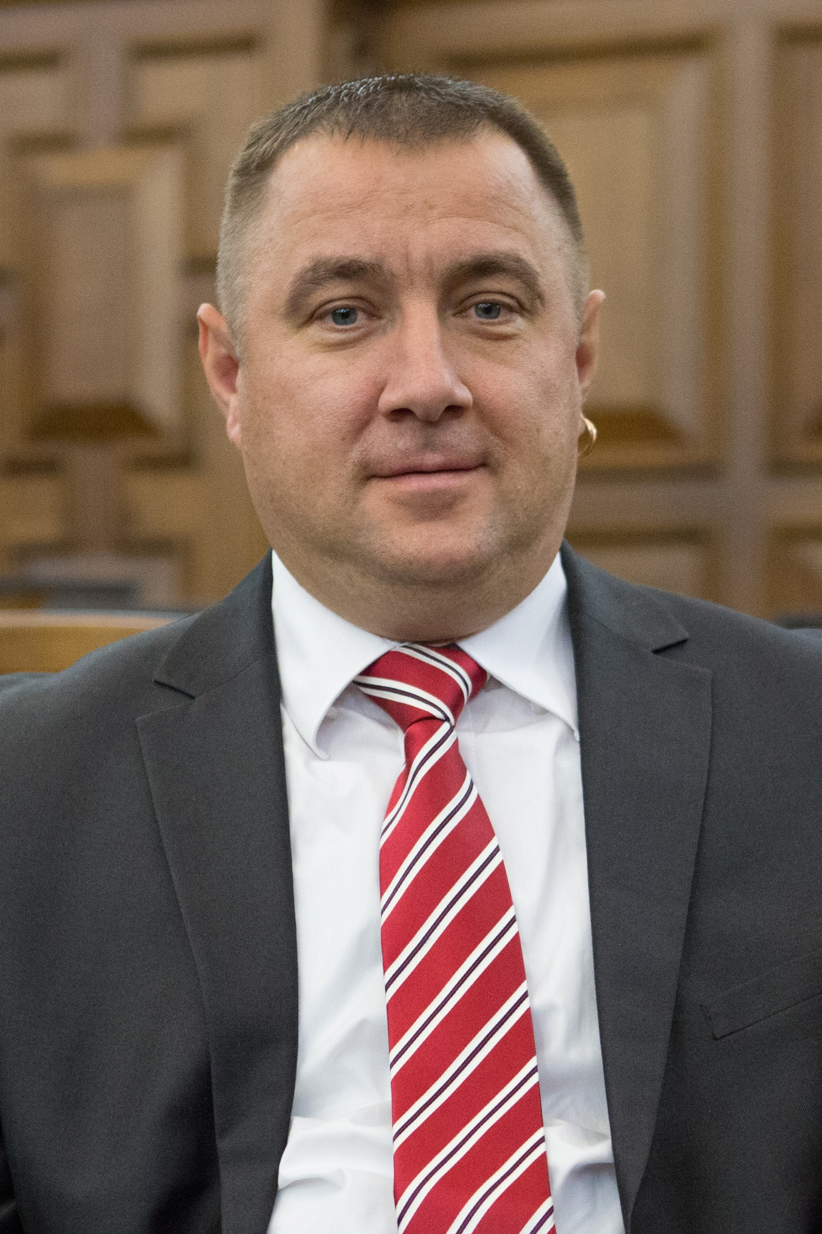 Aigars Apinis